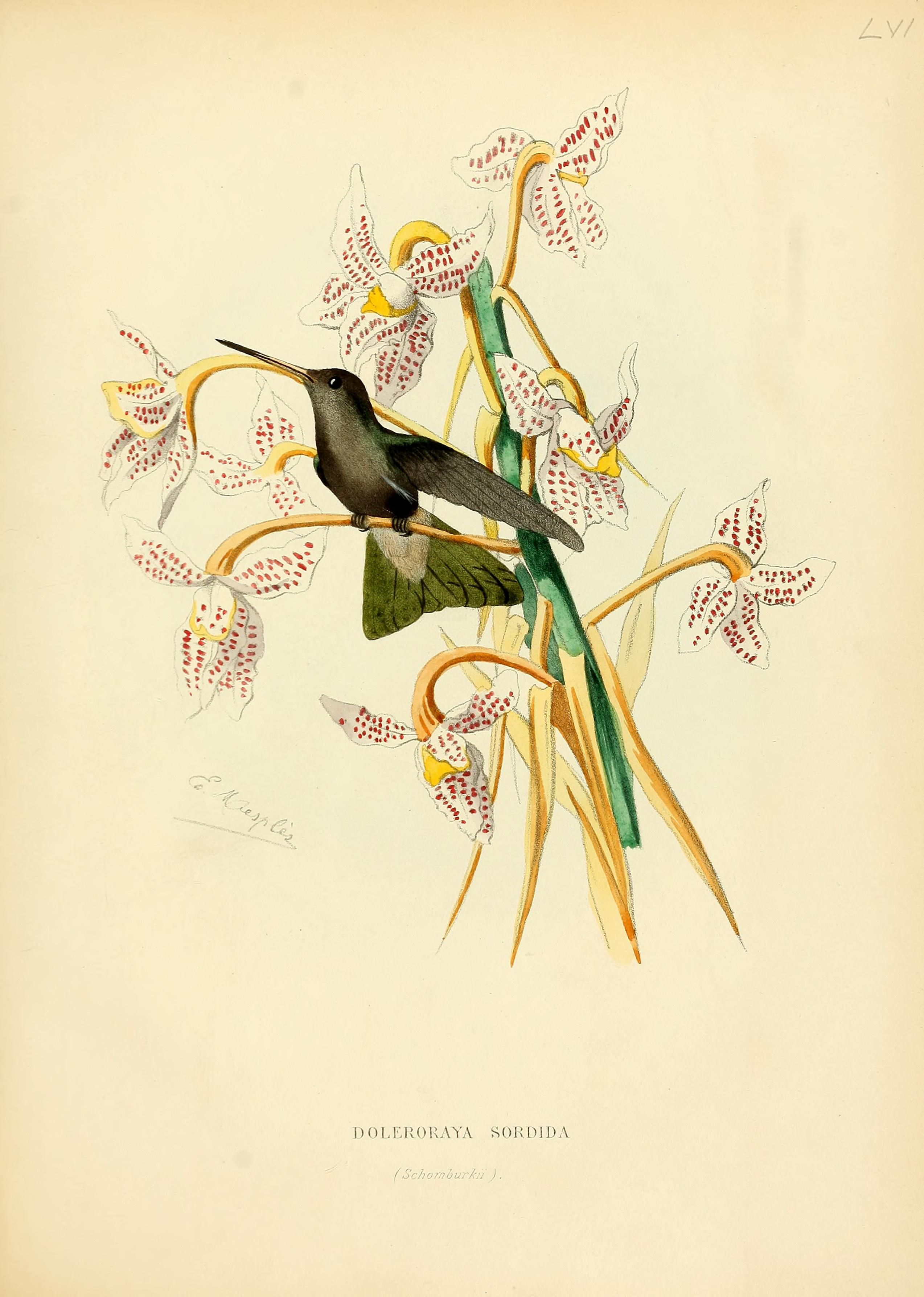 Doleroraya sordida = Cynanthus sordidus[1]